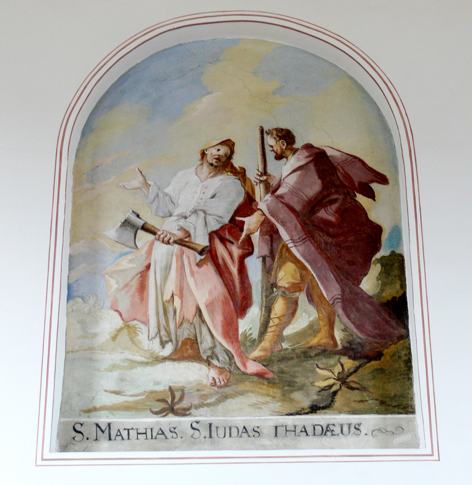 Oberzell, Ortschaft Taldorf, Stadt Ravensburg Kirche zur Schmerzhaften Muttergottes Wandgemälde Apostel matthias und Judas Thaddäus Werkstatt von Josef Anton Hafner, um 1750